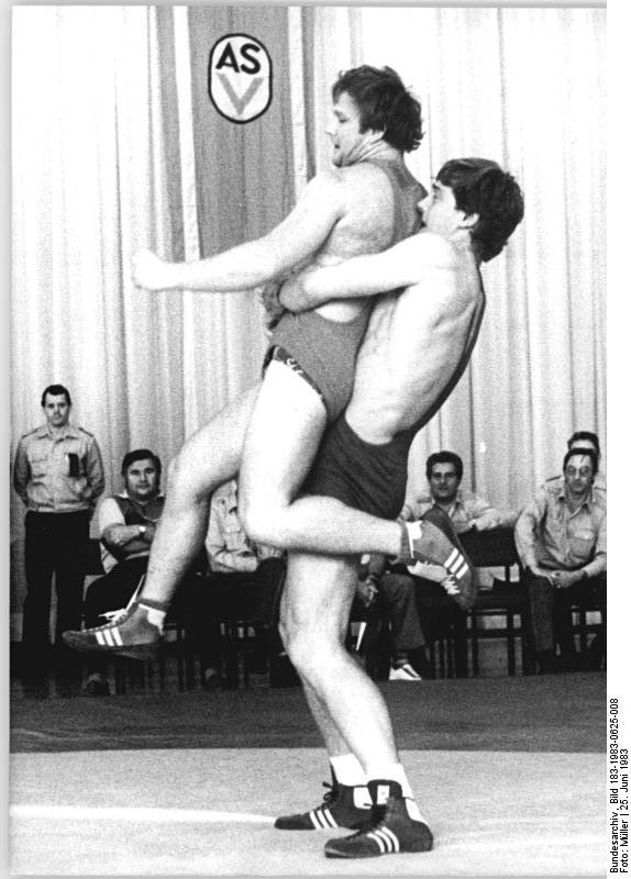 Thomas Horschel, Uwe Richter ADN-ZB Müller 25.6.83-pra Frankfurt-Oder: DDR-Meisterschaften im Klassischen Ringkampf In der Gewichtsklasse bis 100 kg setzte sich Thomas Horschel (r.) vom ASK Vorwärts Frankfurt-Oder im Kampf gegen Uwe Richter von der BSG Chemie Weißwasser durch.